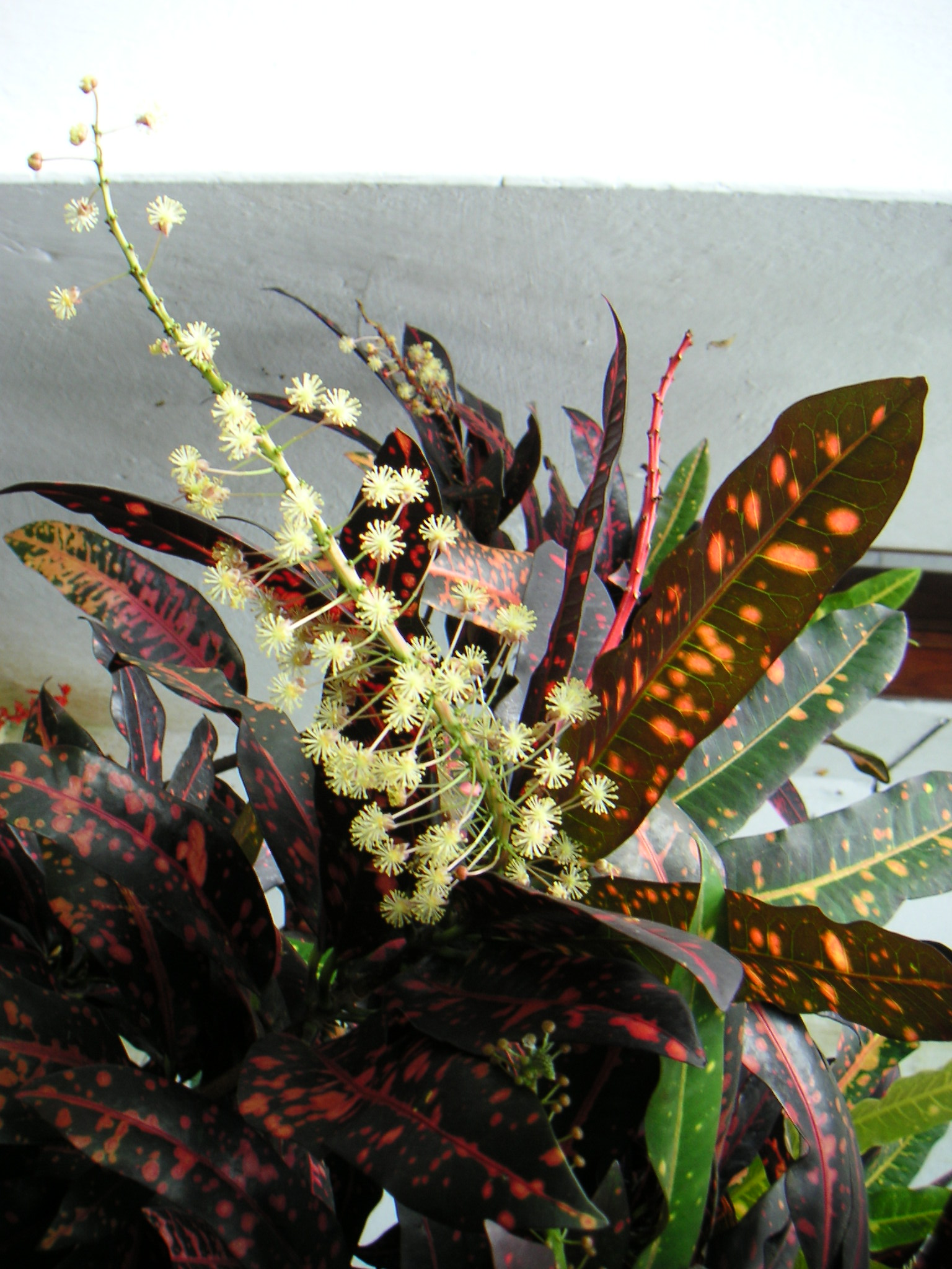 Codiaeum variegatum, Euphorbiaceae, male inflorescence - Cali / Kolumbien